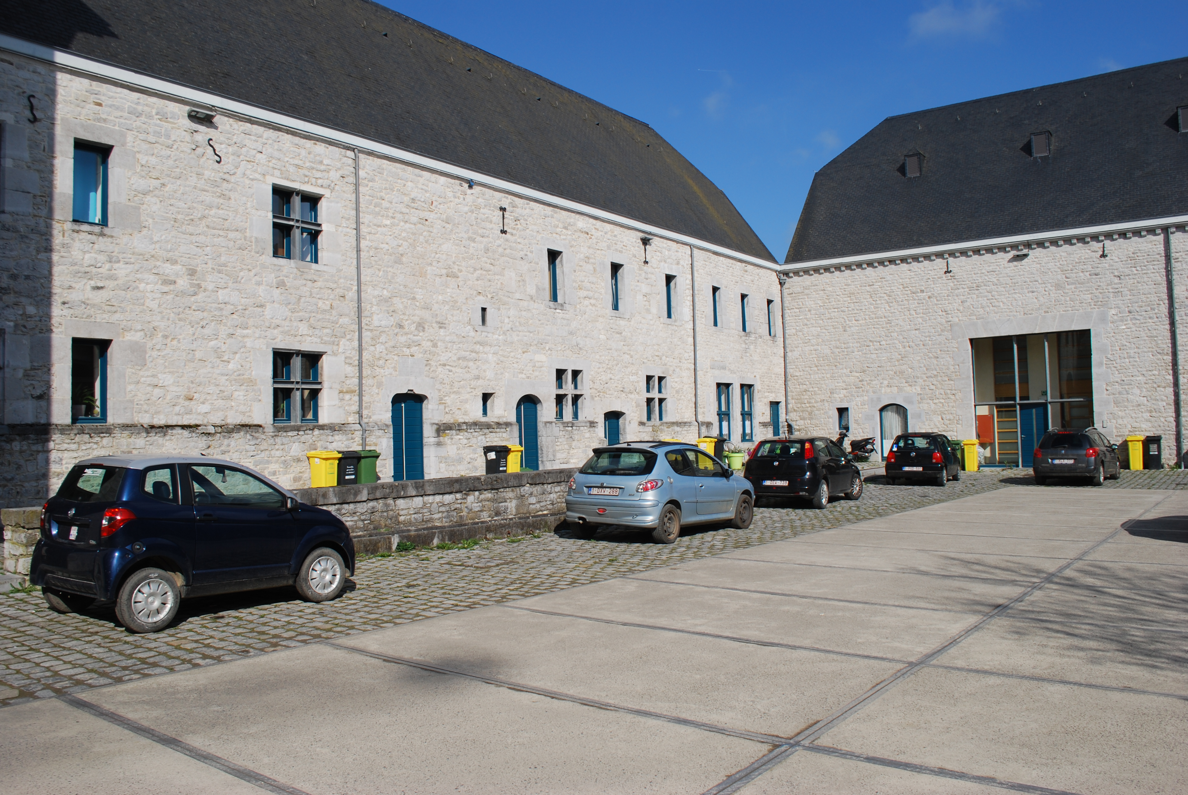 Vue du village de Anthisnes (province de Liège, en Belgique).